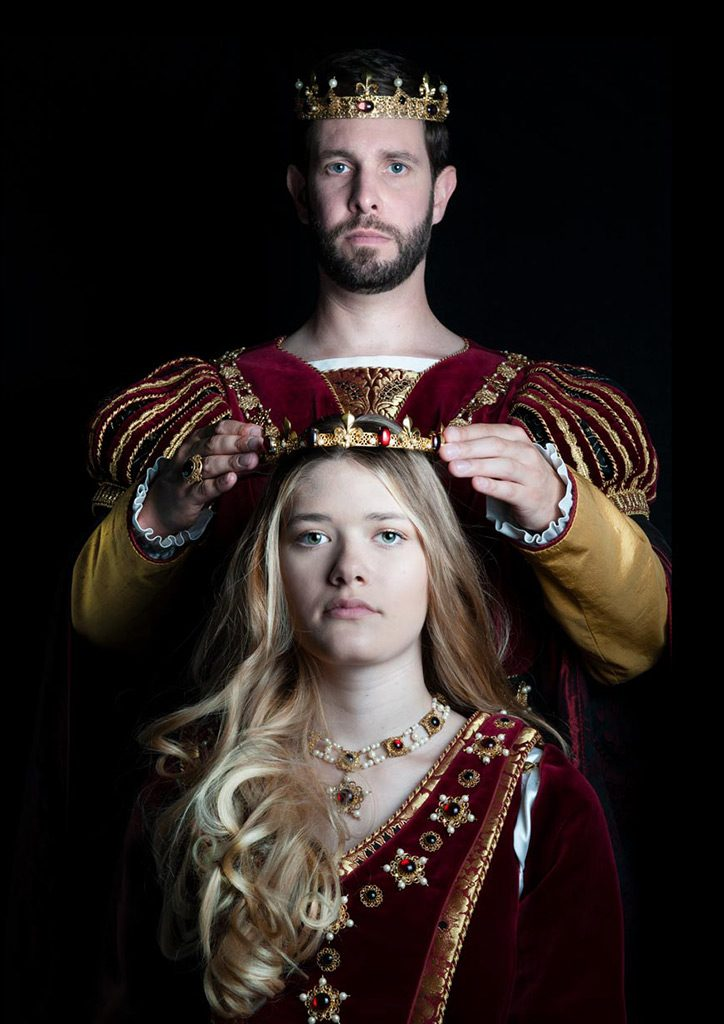 Das Herzogspaar der Festspiele 2019: Kristina Kohlhäufl und Dr. Benedikt Gröschl als Agnes Bernauer und Herzog Albrecht III